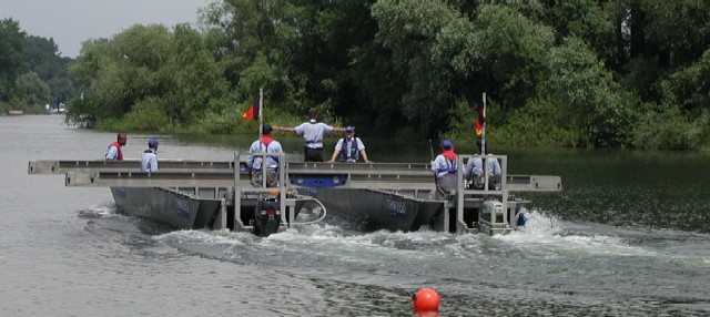 Mehrzweckpontons im Verband als Fähre, selbst fotografiert